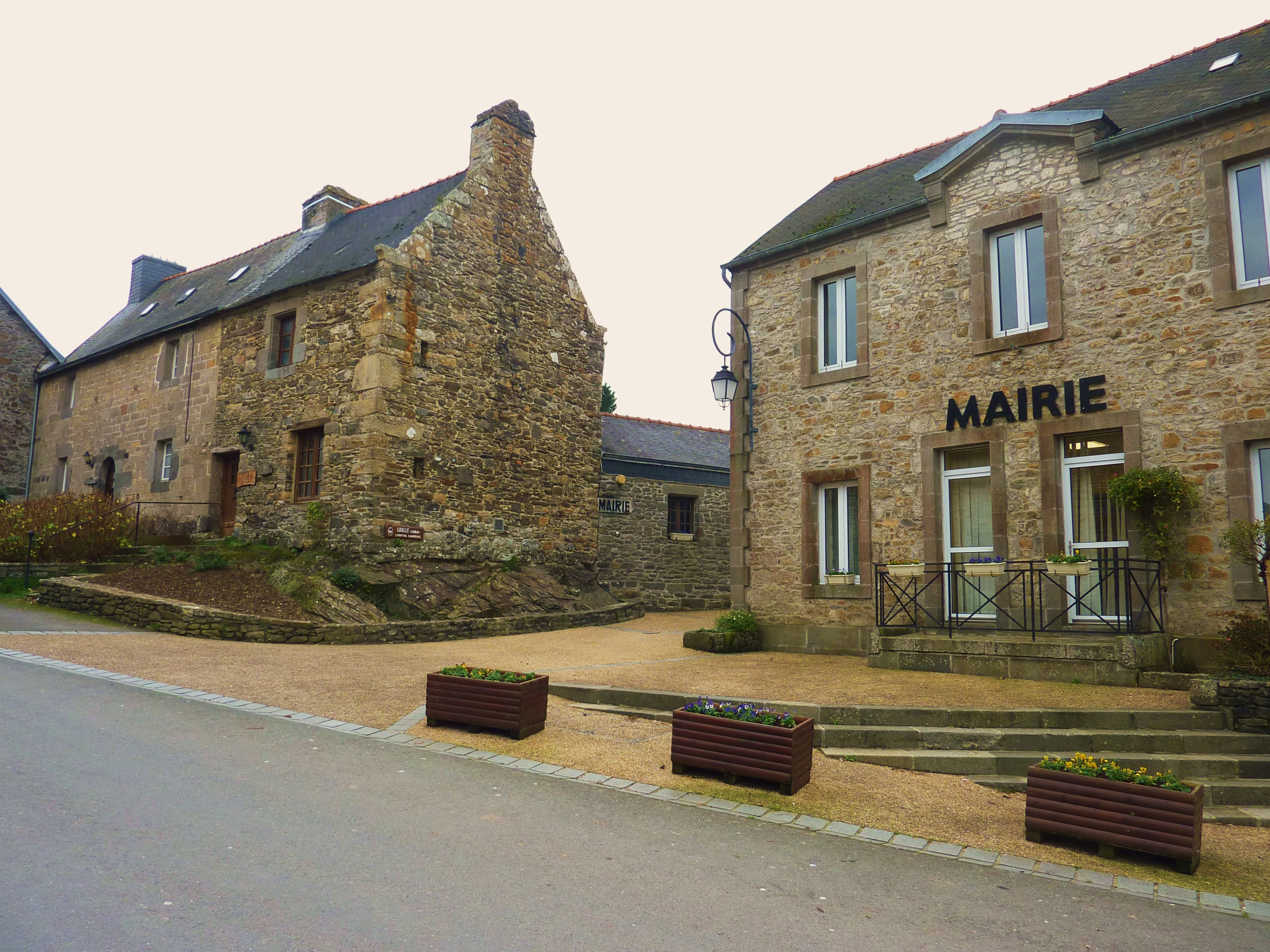 L'Hôpital-Camfrout : la mairie et une maison ancienne